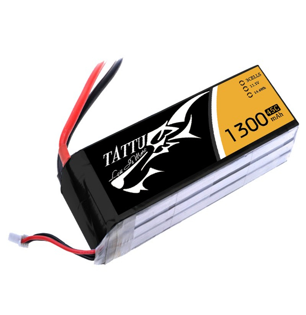 Une pile Lithium Ion